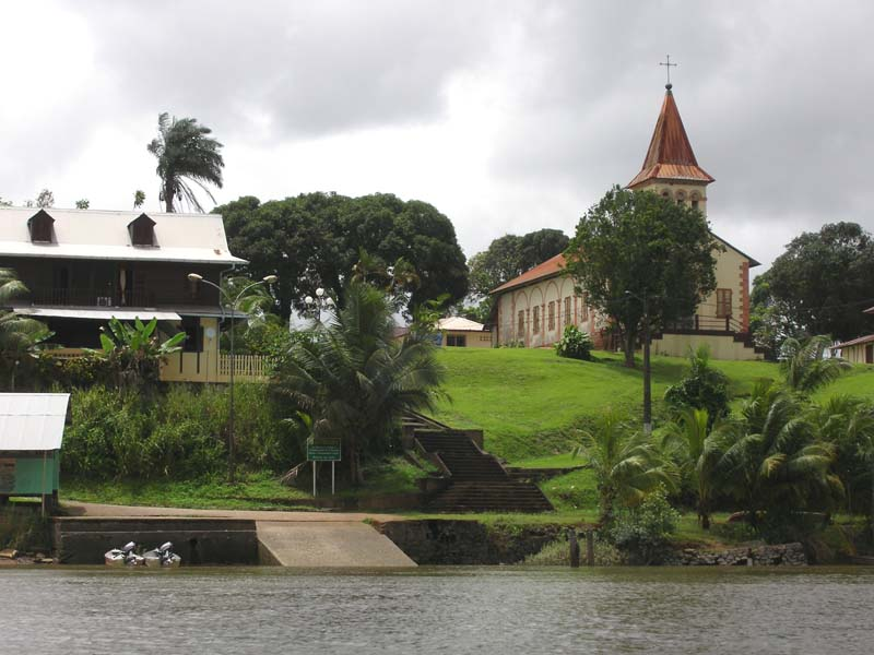 Vue de la Commune de Roura depuis l'Oyak